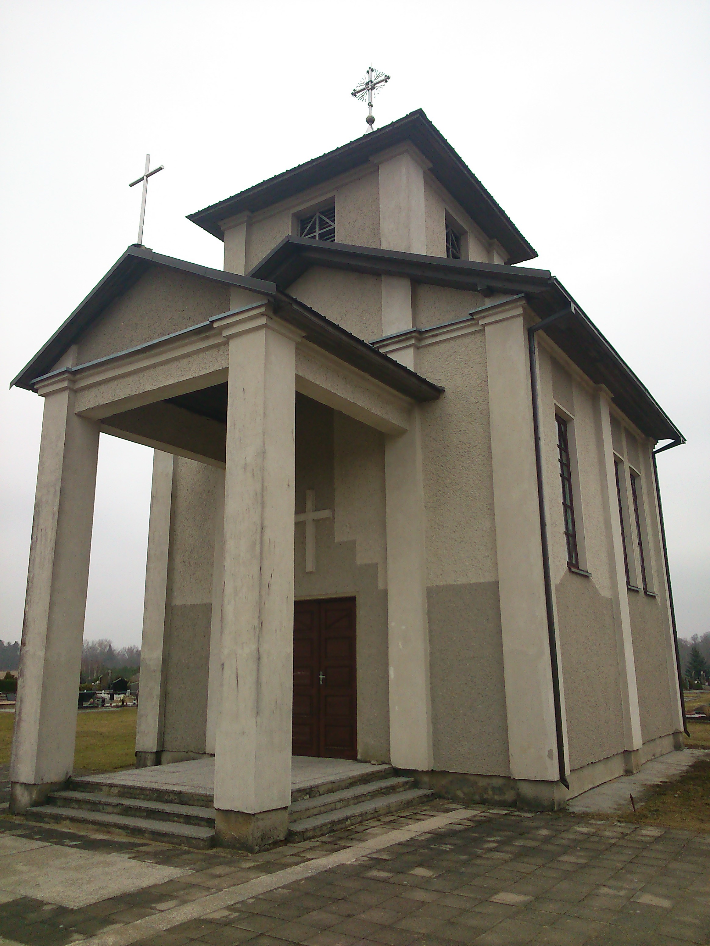 Jonava cemetery, koplyčia